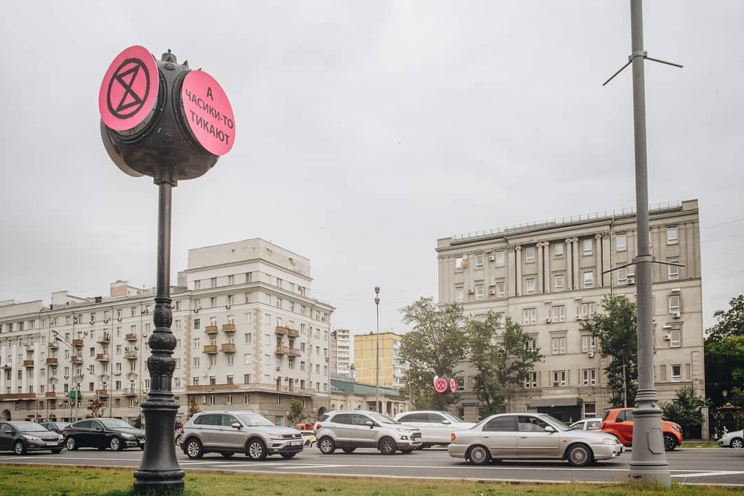 Street with XR logos on street clock